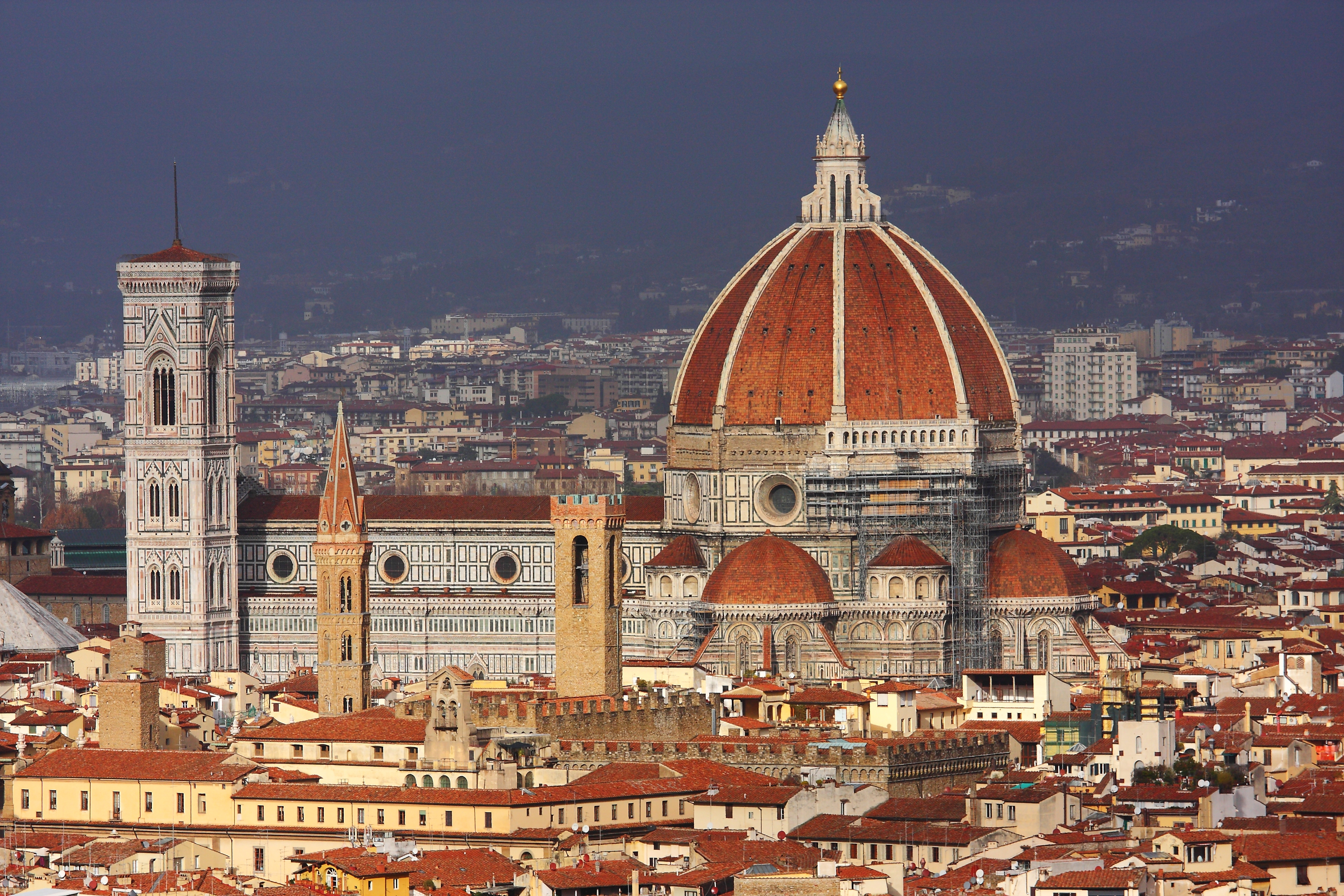 Catedral de Florencia desde la Piazzale Michelangelo.